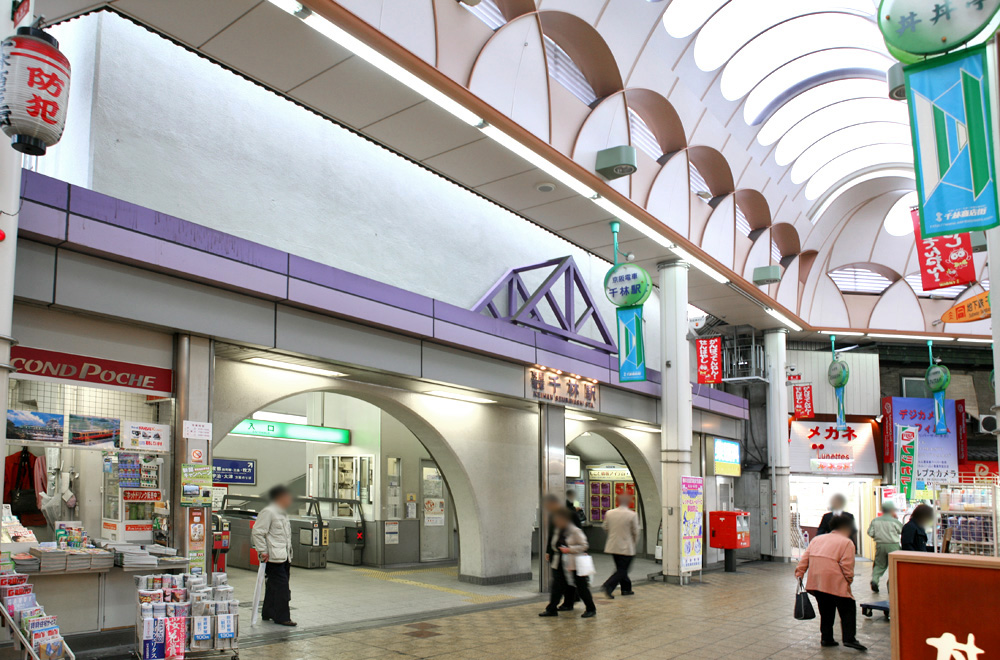 Keihan Sembayashi Station